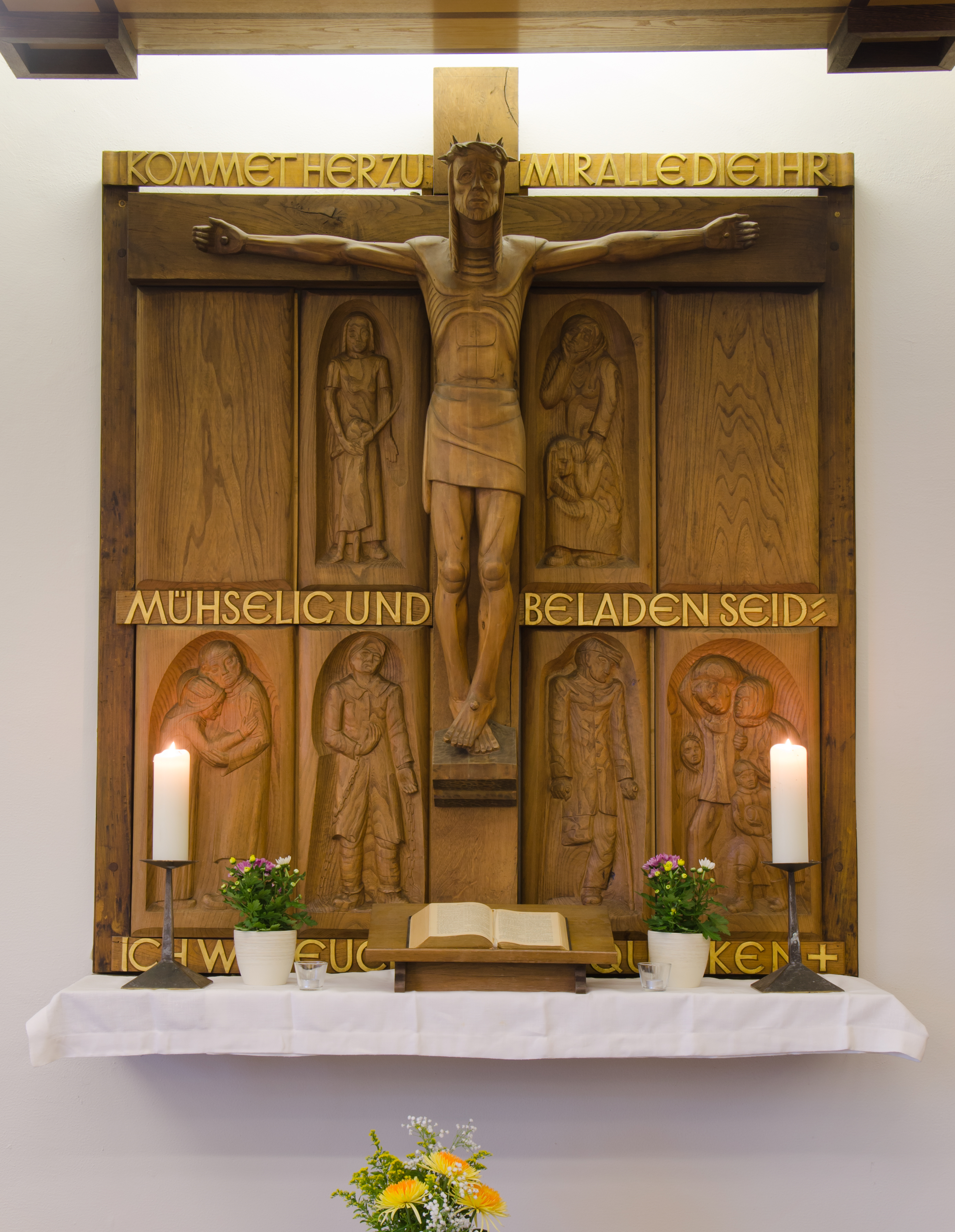 Hamburg-Wandsbek Christuskirche Relief im Vorraum